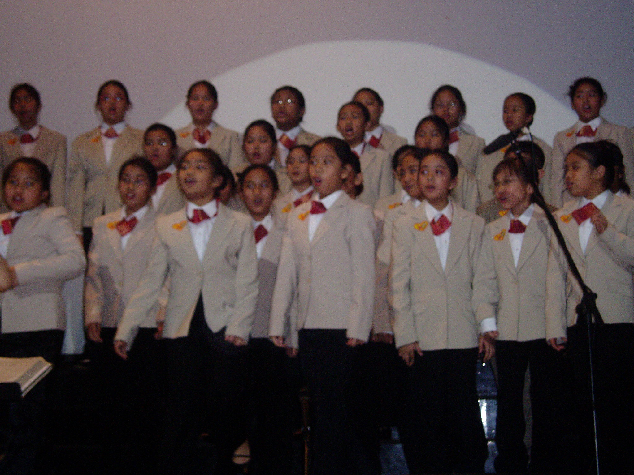 Tagalog: SERENATA Working Committee, SERENATA